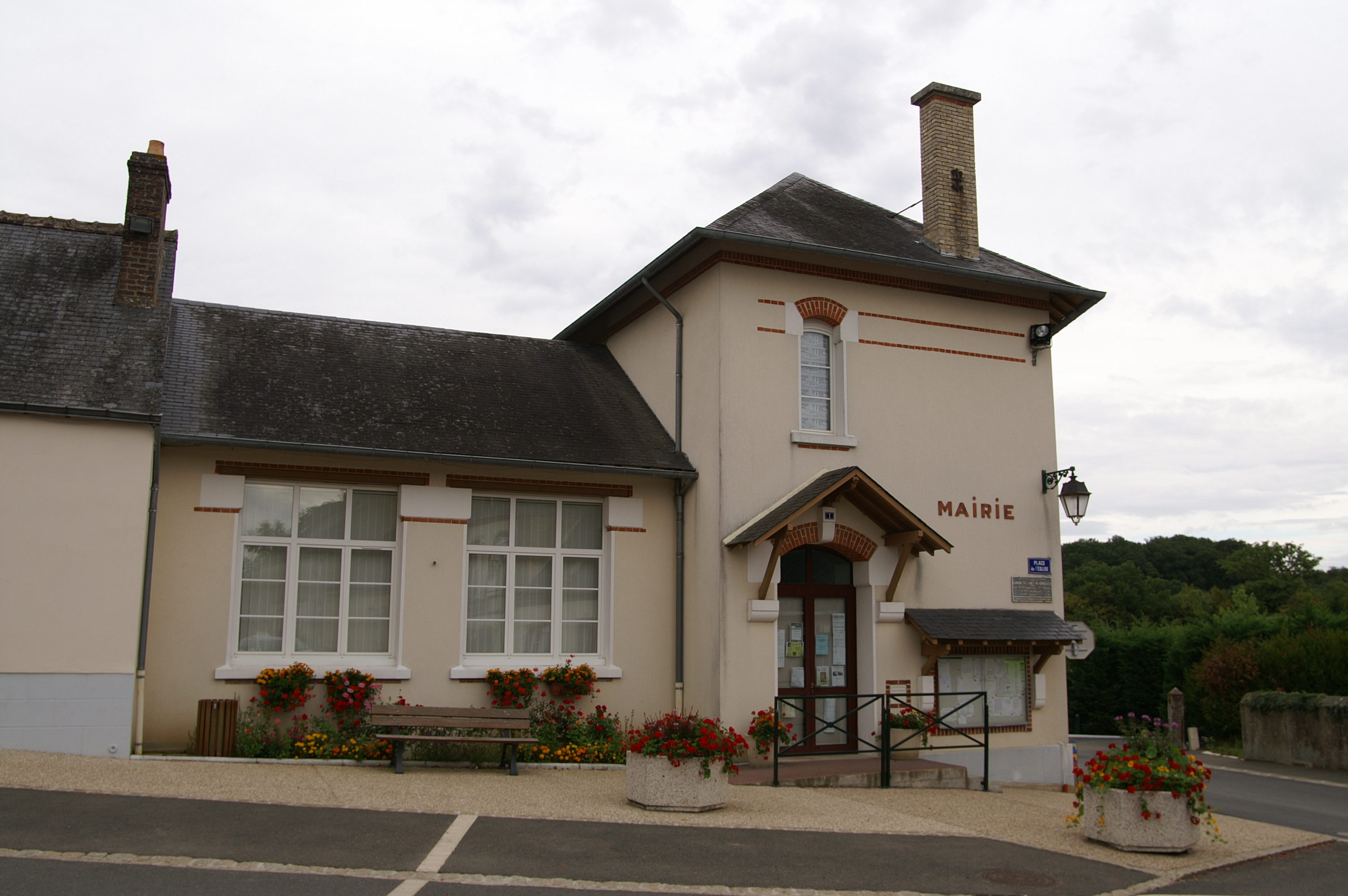 Mairie de Marolles-lès-Saint-Calais.